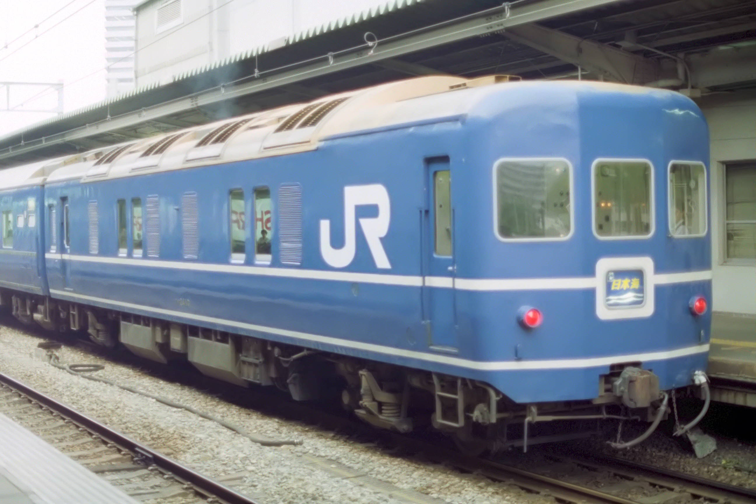 カヤ24 10 大阪駅